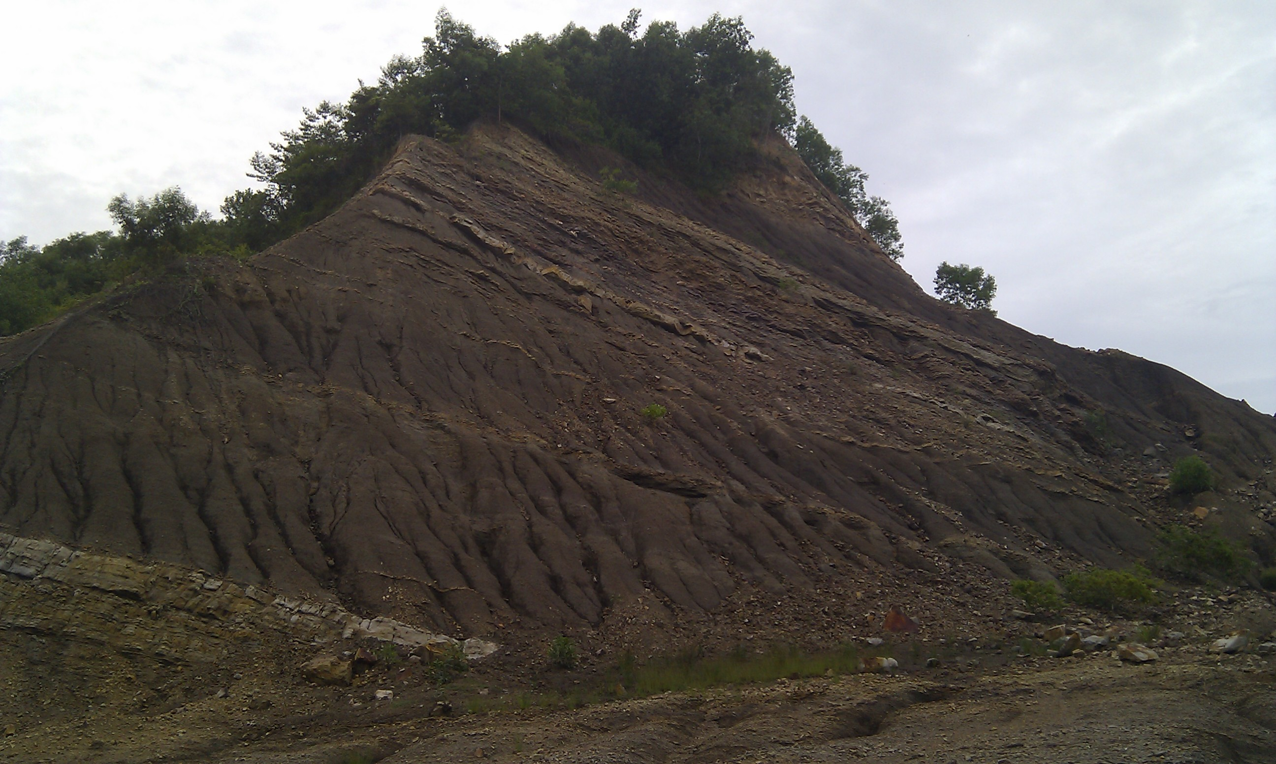 Pemandangan Bukit Kubong dari laluan arah TUDM Bukit Kubong.